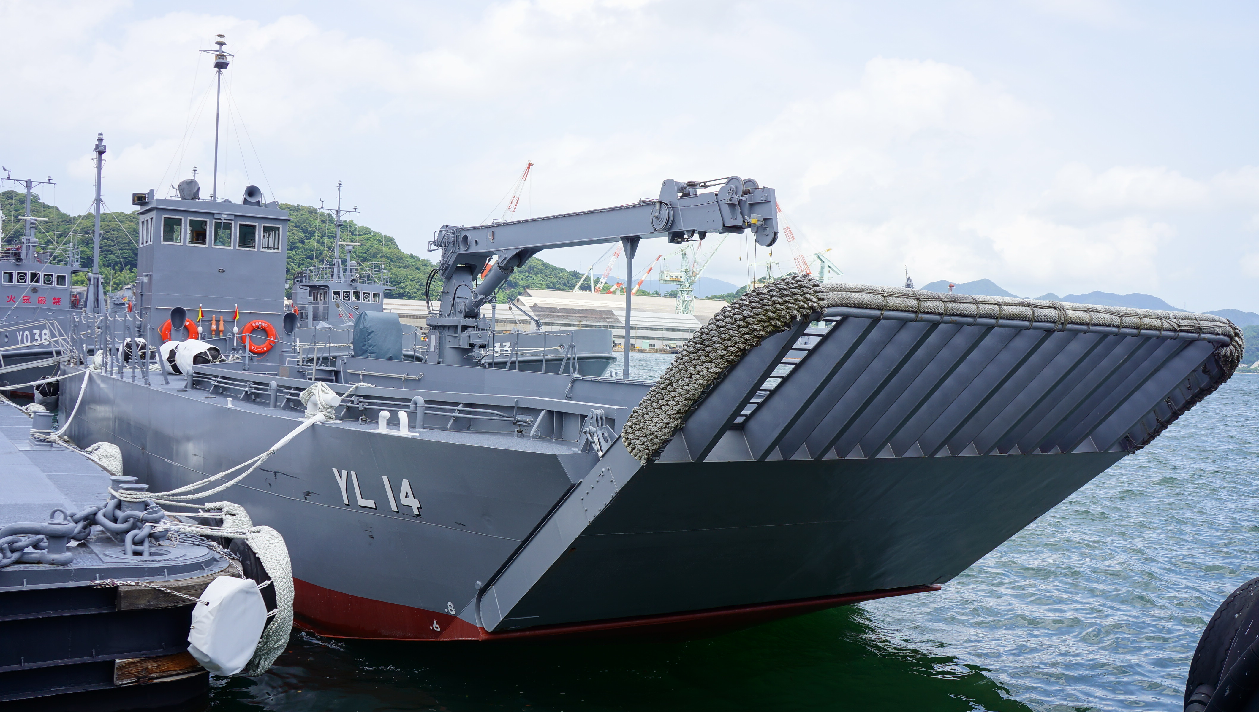 海上自衛隊 運貨船14号（YL-14）。 14年7月27日 海上自衛隊舞鶴基地にて。